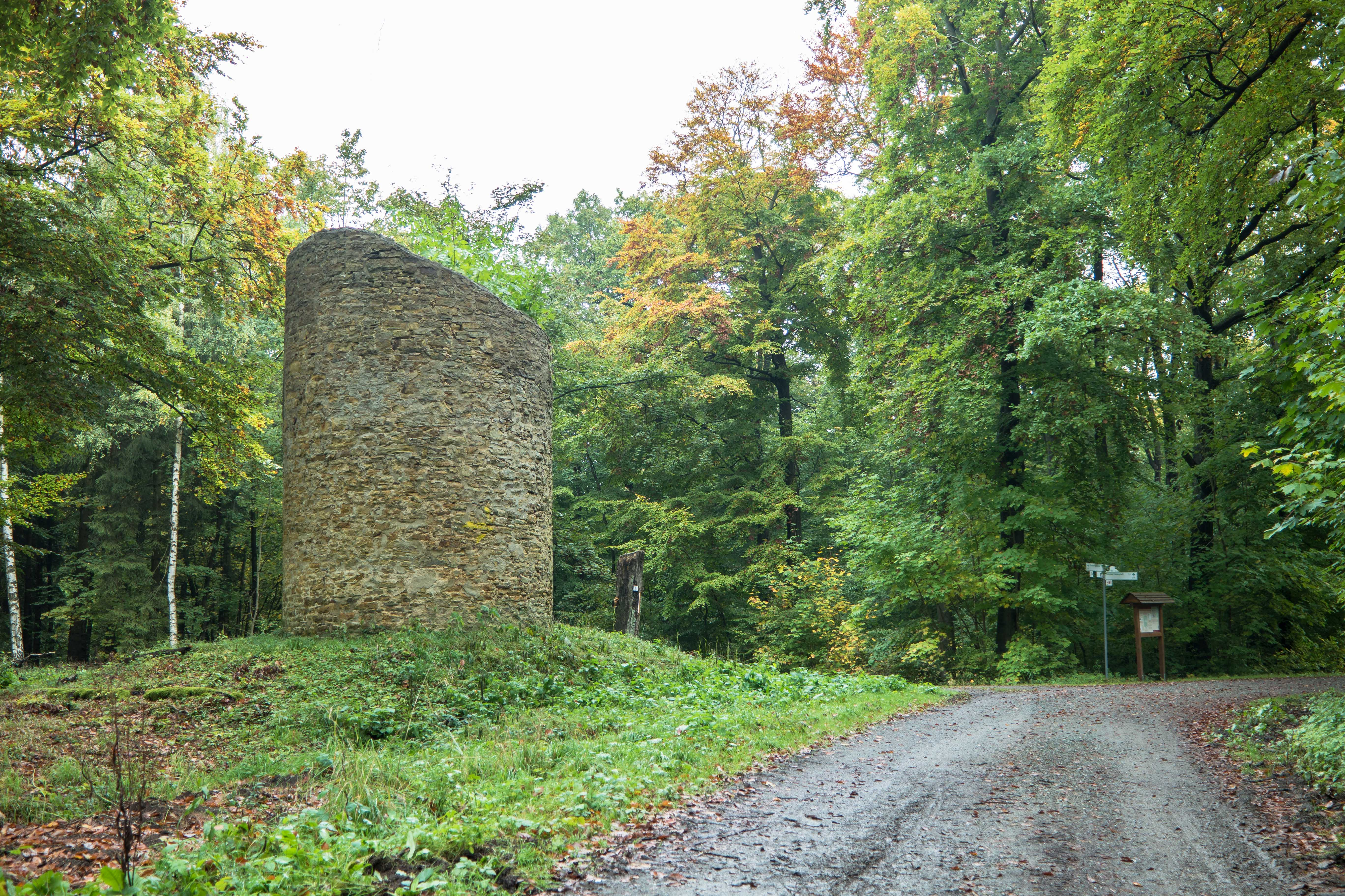 1. Walbecker Warte im Lappwald bei Helmstedt